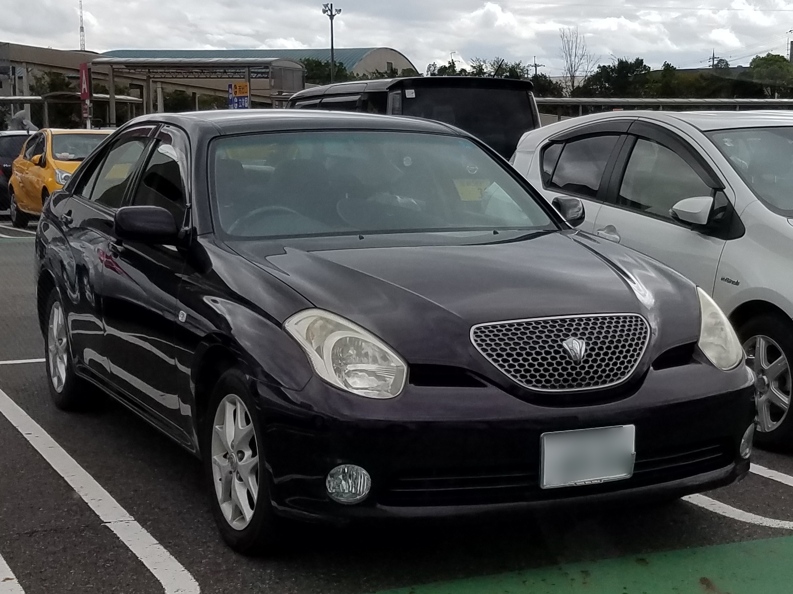 ヴェロッサ 25